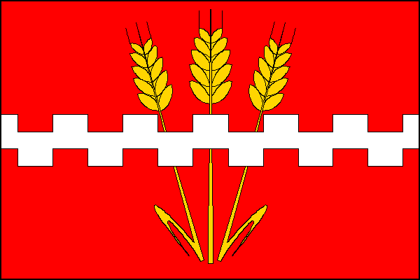 vlajka, Měrovice nad Hanou ,okres Přerov